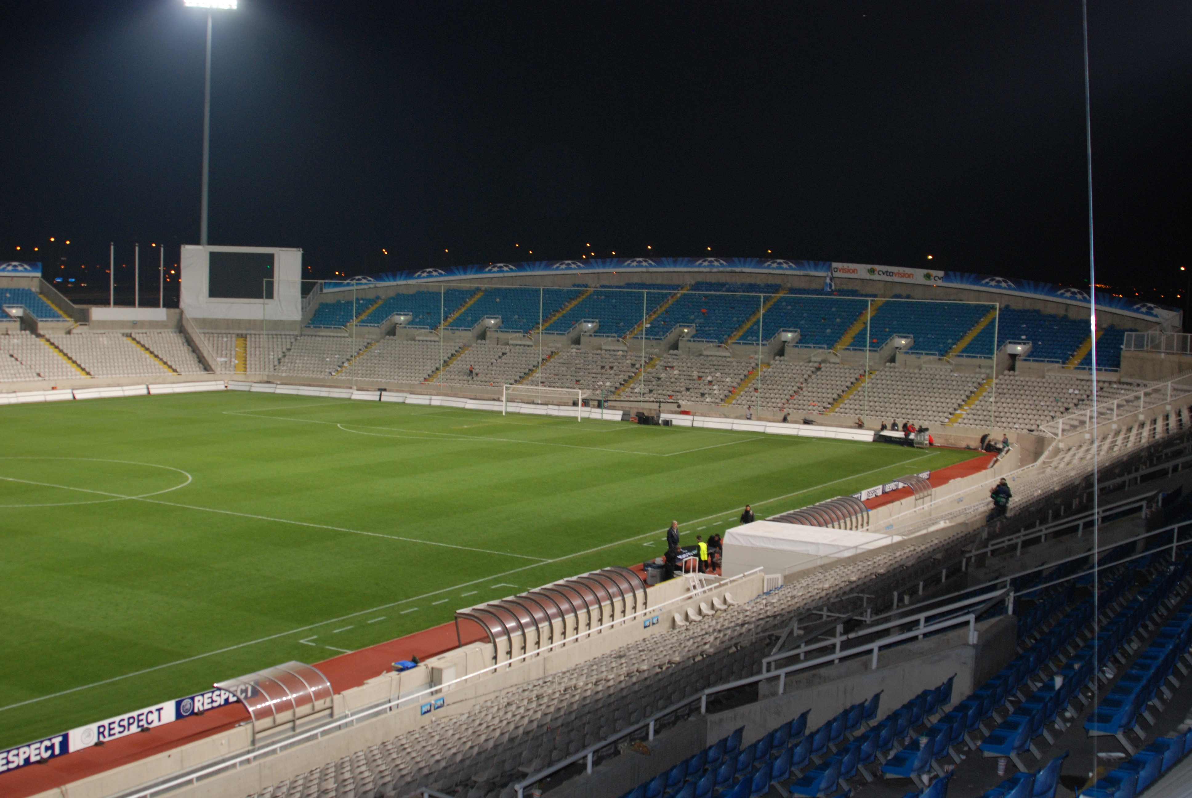 APOEL - real madrid